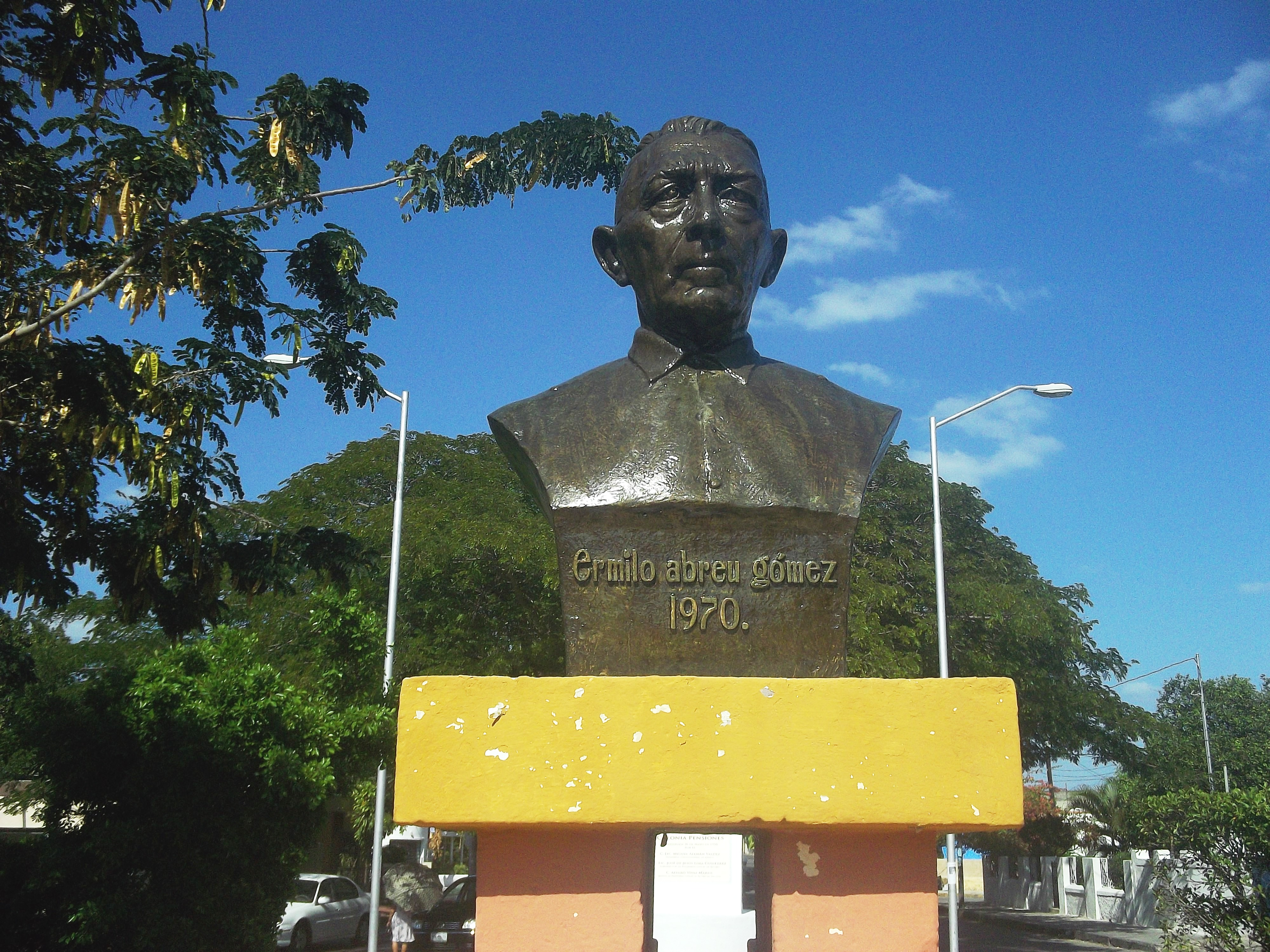 Busto de Ermilo Abreu Gómez, Mérida, Yucatán.